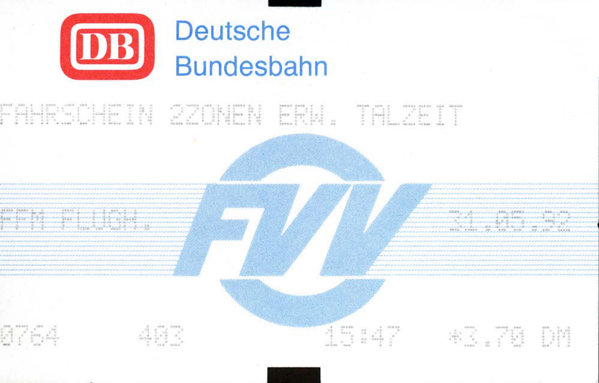 Fahrschein 2 Zonen Erwachsener Talzeit FVV, ausgegeben durch die Deutsche Bundesbahn